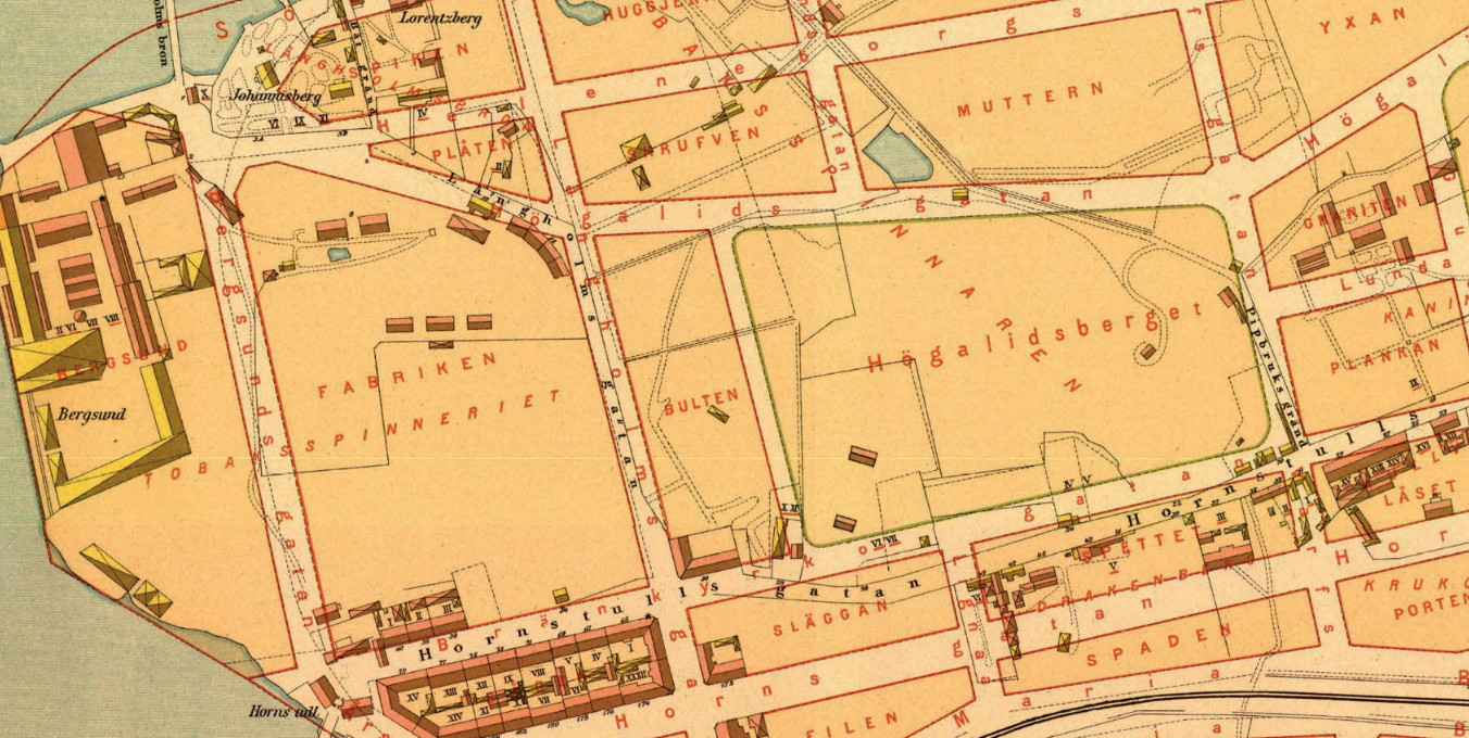 Karta över Stockholm, del av västra Södermalm